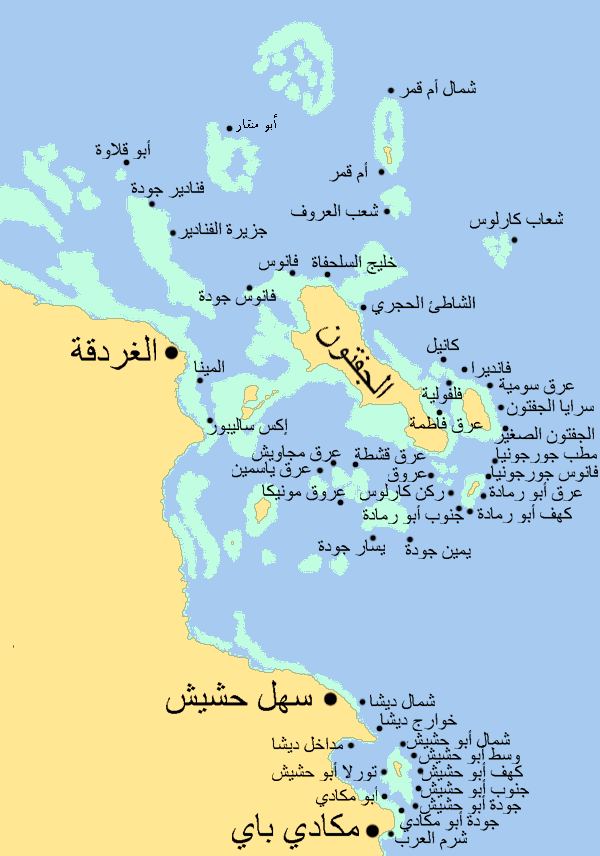 خريطة جزر الجفتون بالبحر الأحمر، مصر